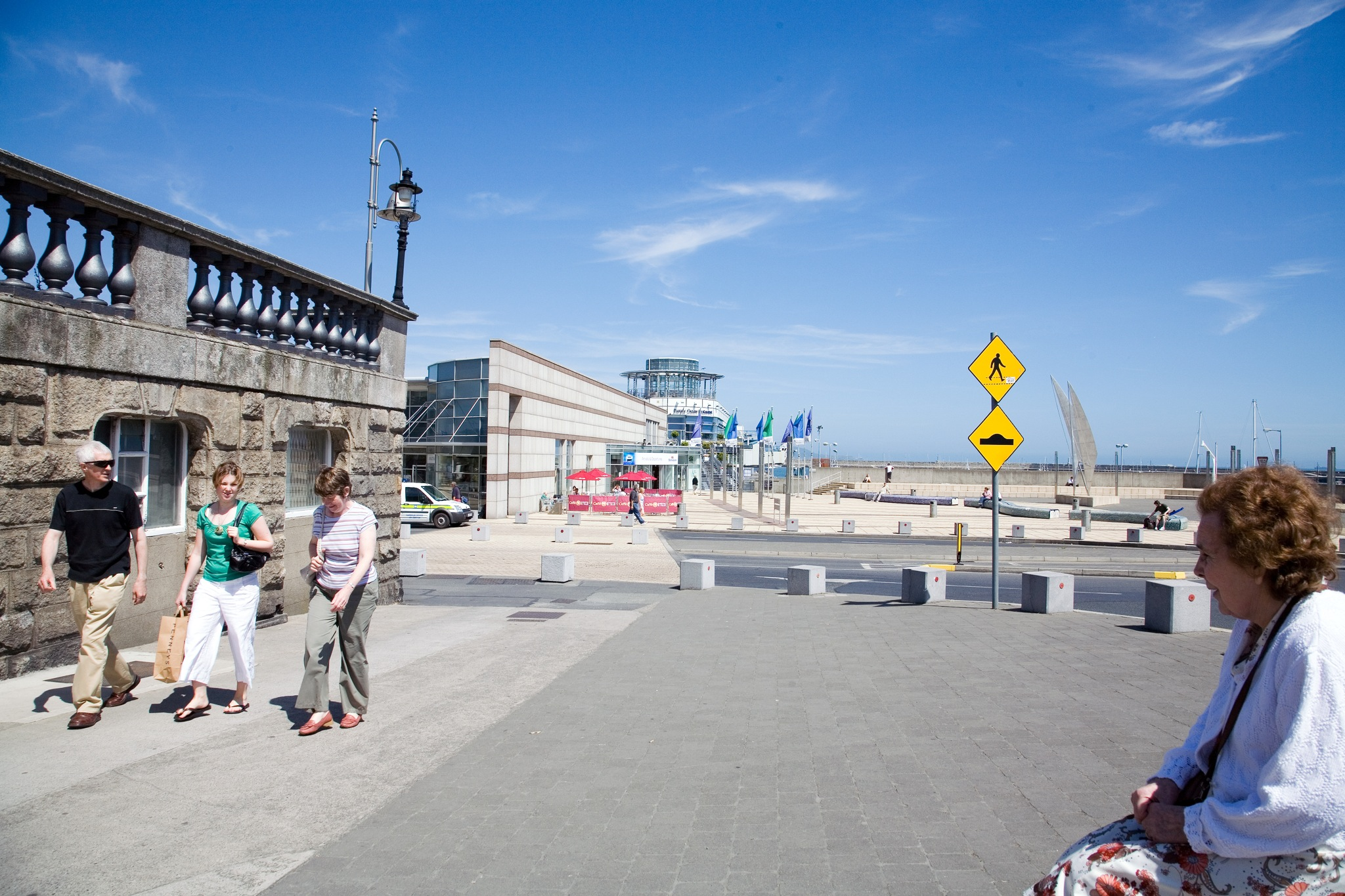 Dun Laoghaire